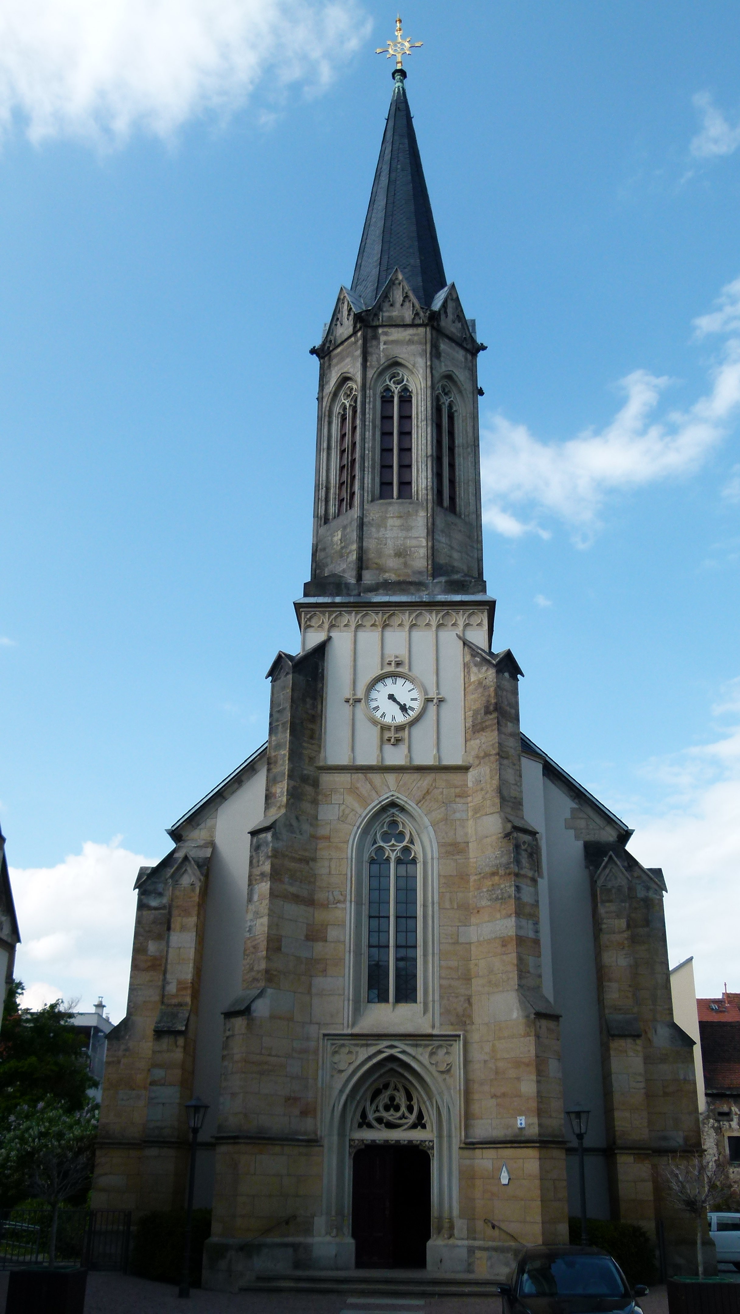 Denkmalgeschützte Katholische Kirche St. Kunigunde, Dr. Wilhelm Külz-Straße 3, Pirna, Sachsen